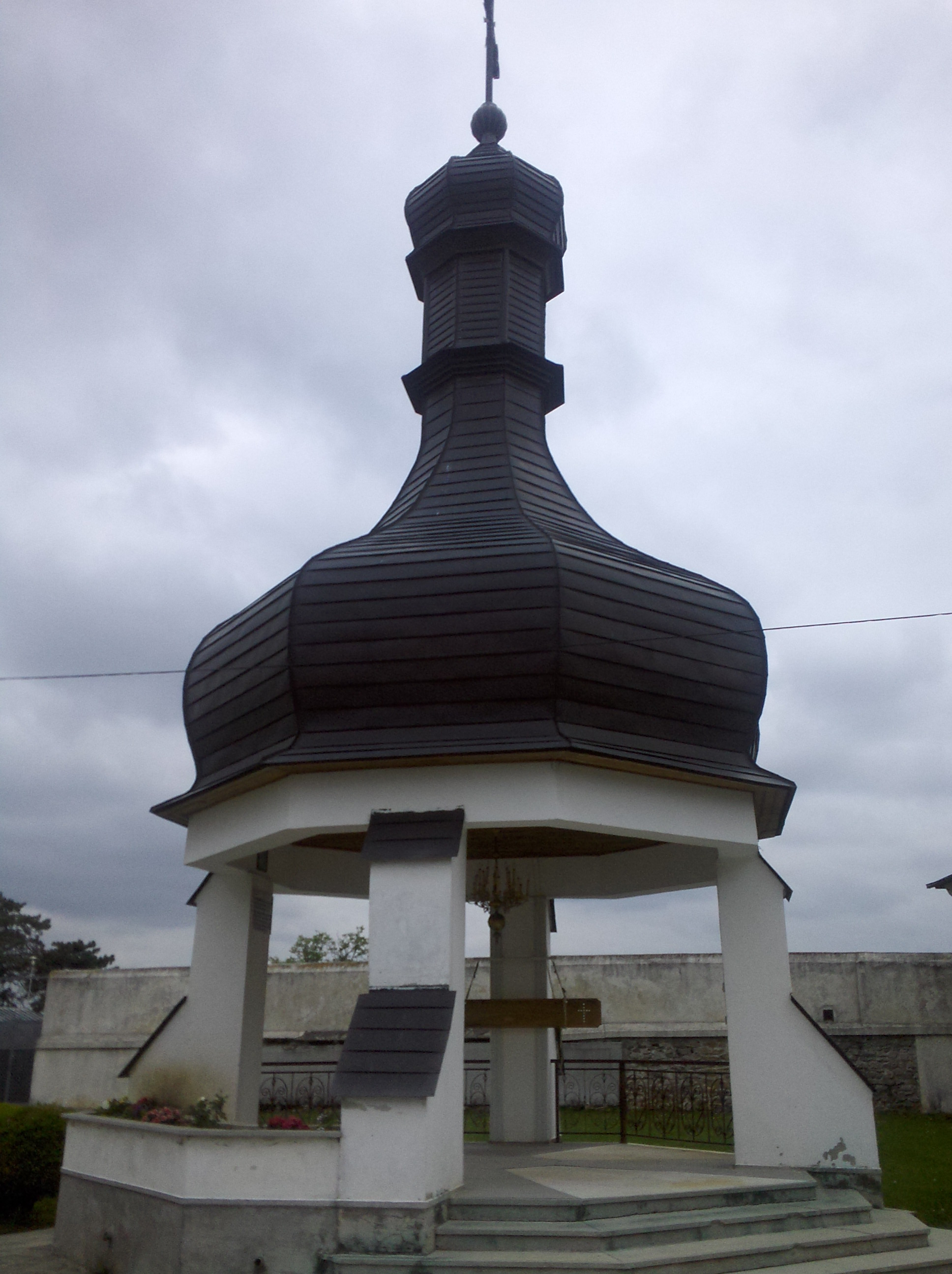 edificiu anex (probabil agheasmatar) al catedralei arhiepiscopale din Roman 01